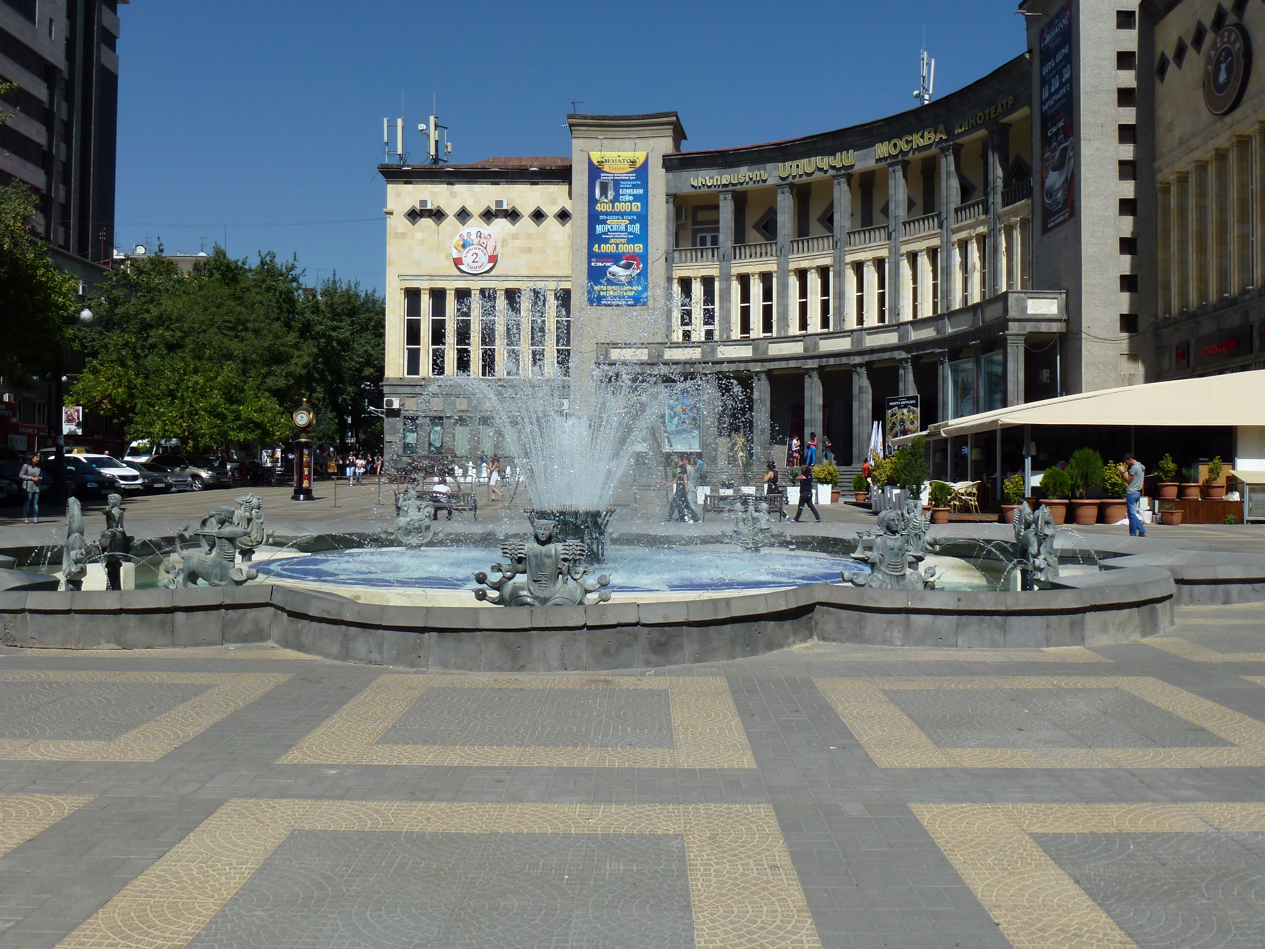 Կինոթատրոն «Մոսկվա» 6/178.3.1